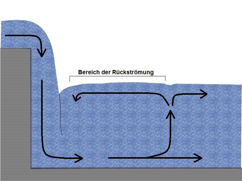 Zeichnung der Strömungen in einer Wasserwalze (z. B. an einem Wehr)